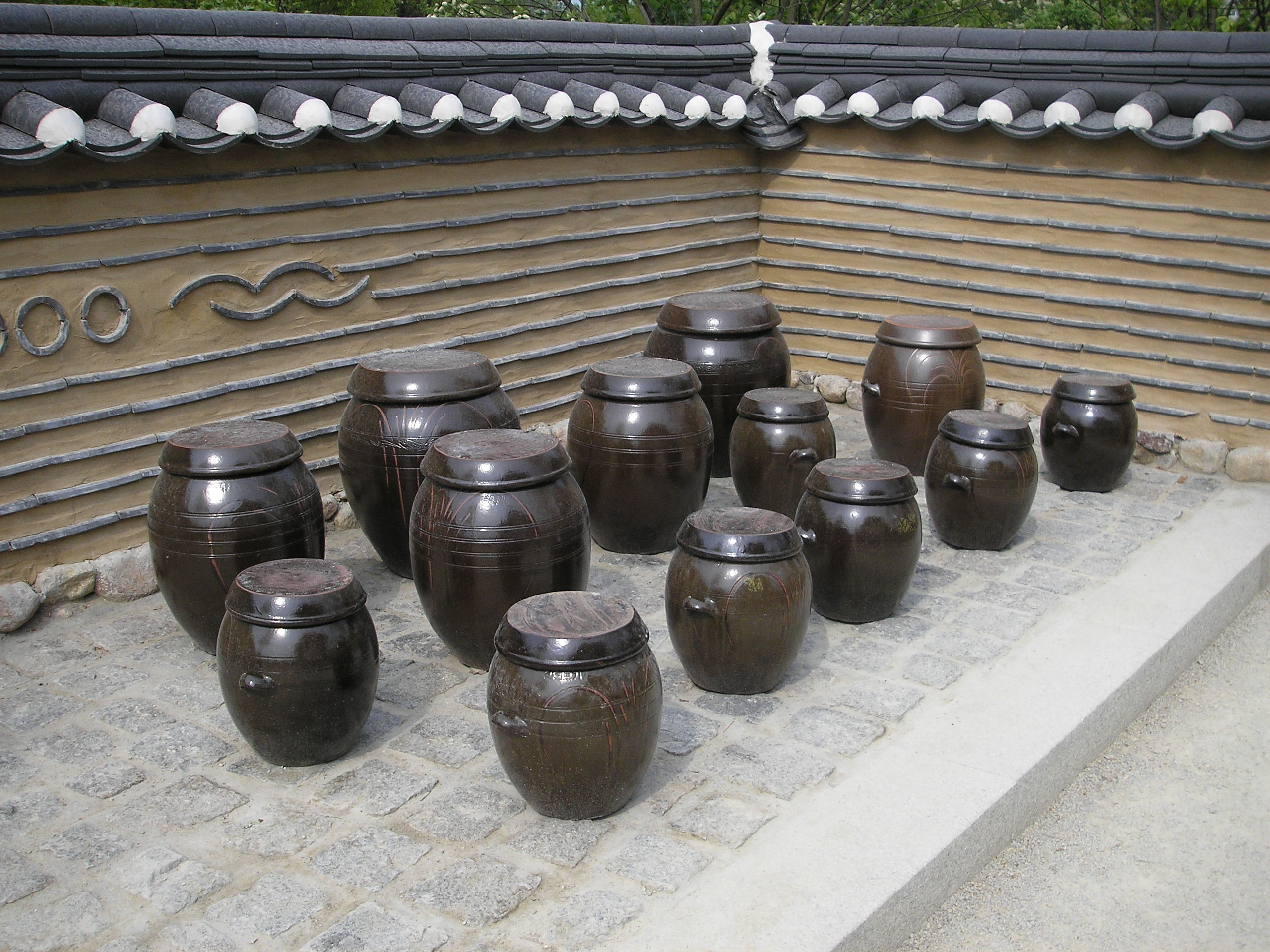 Korean garden in Gärten der Welt, Berlin-Marzahn. Jars for storing kimchi.